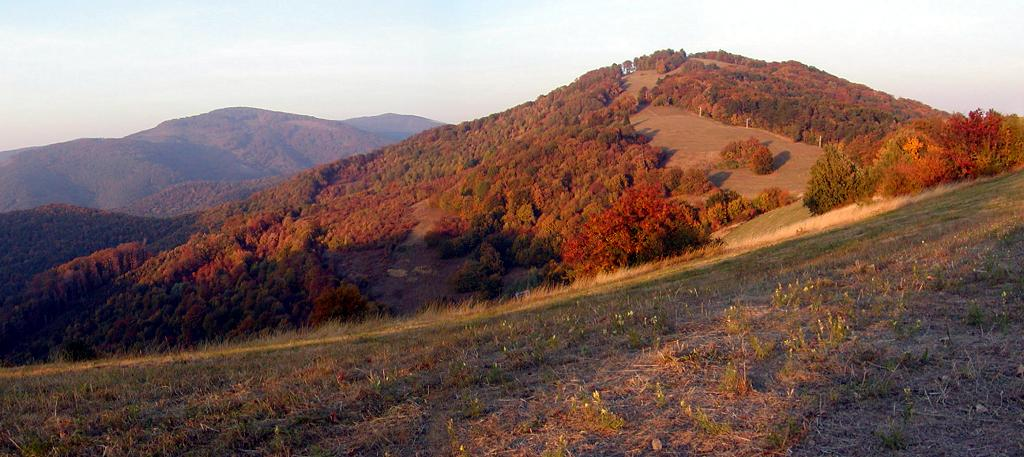 Bezovec (763 m n.m.), Považský Inovec, Slovensko.